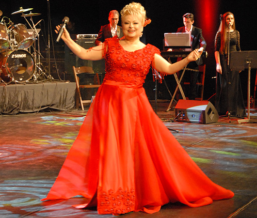 Во третиот концерт без изведени најголемите хитови низ кариерата: Навек Векуваш Макеоднијо, Гордо Македонијо, Робинка, Бомба, Ај с среќа денот, Џингрлака џикицак...